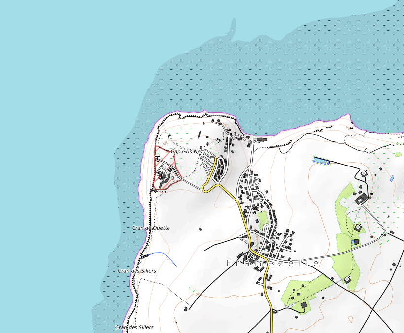 carte réalisée sur umap This map may be incomplete, and may contain errors. Don't rely solely on it for navigation.